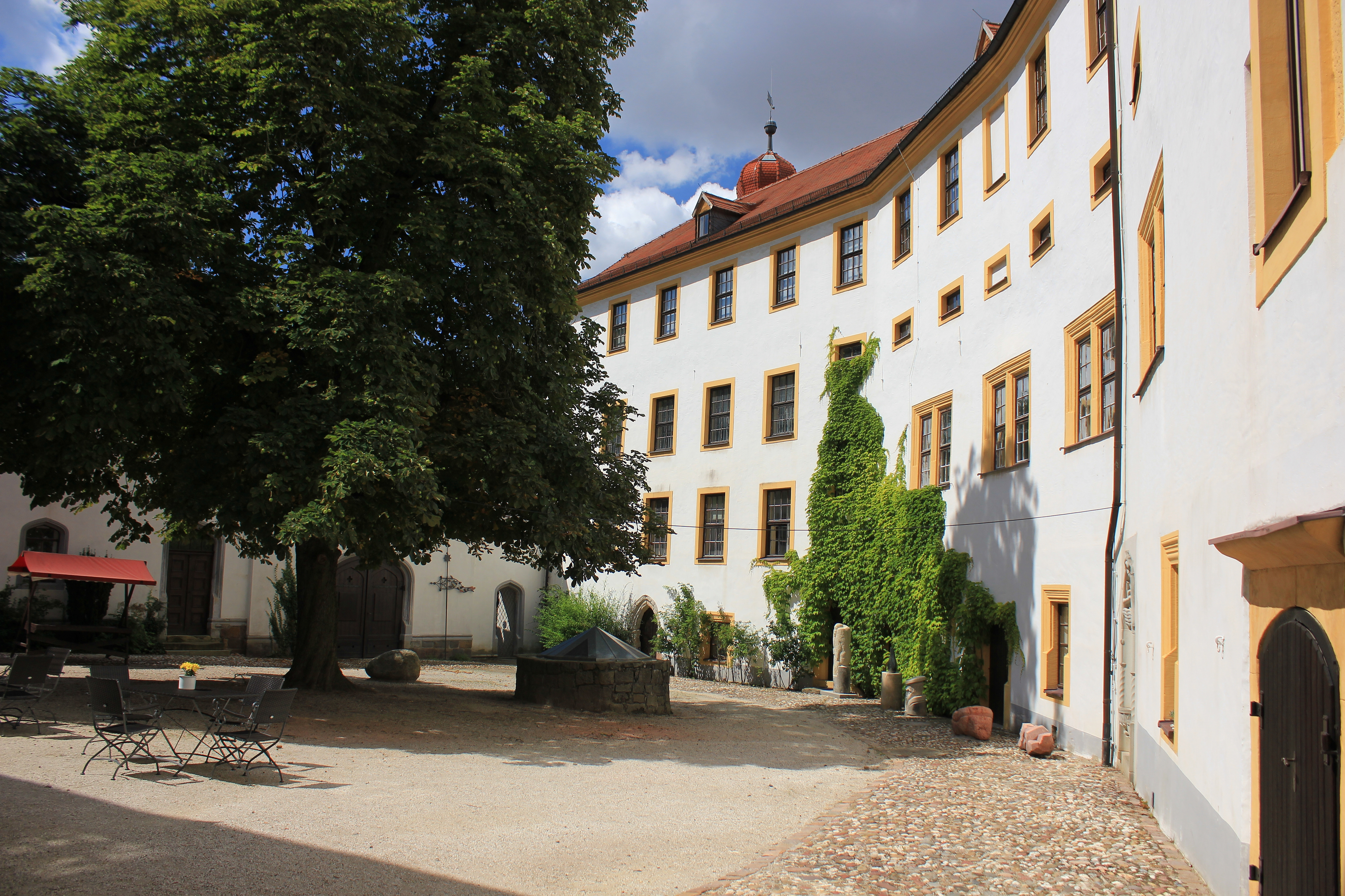 Schloss Glauchau in Glauchau. Sachsen.